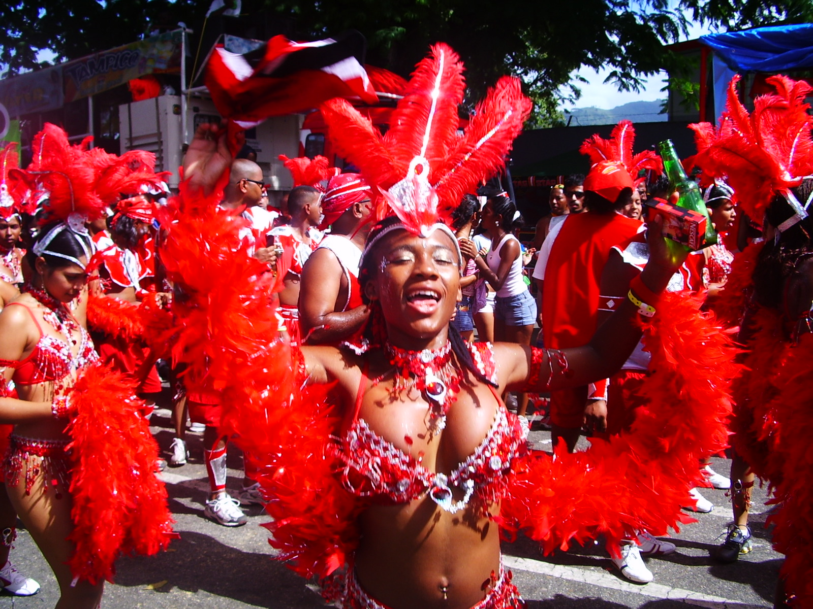 carnaval a trinidad